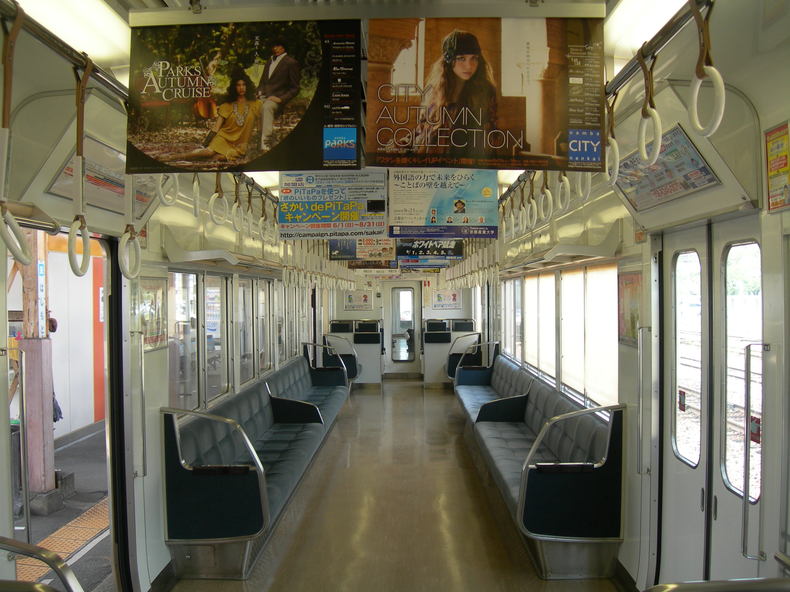 南海2000系電車. 車内.